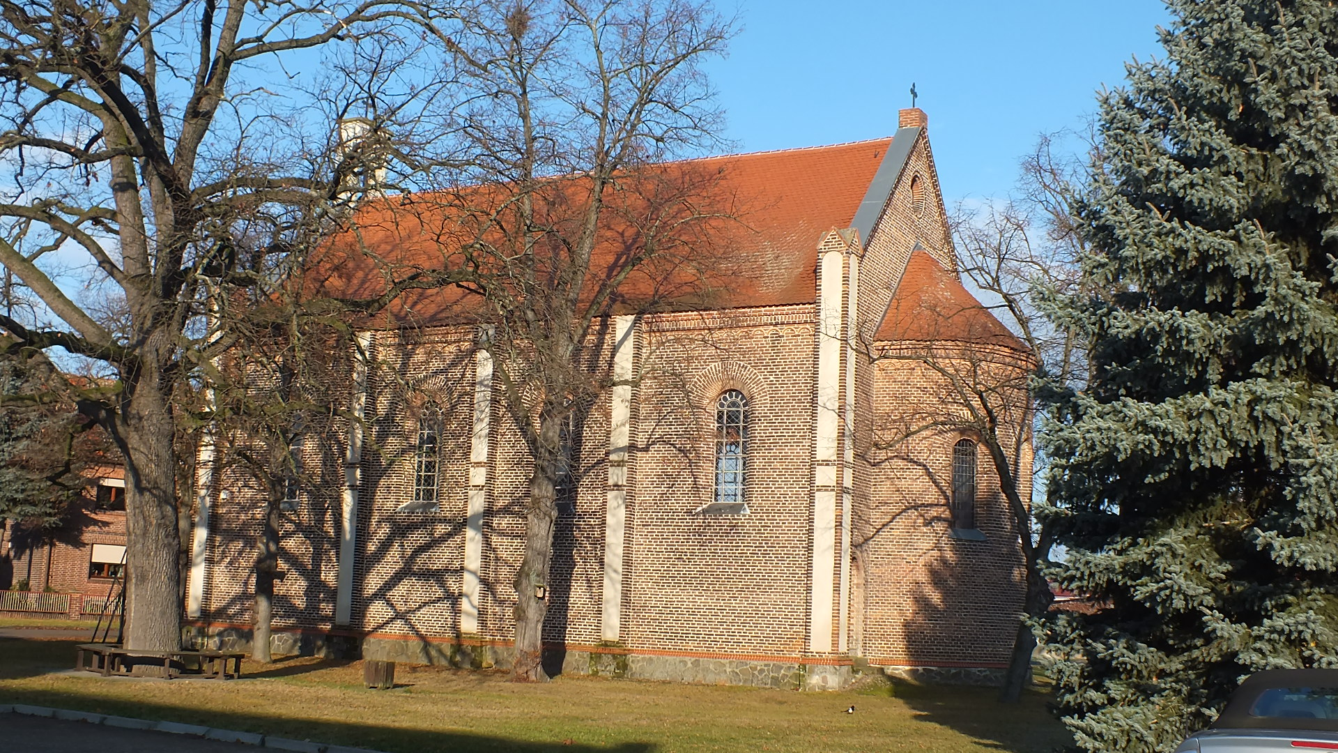 Denkmalgeschützte Kirche in Dietrichsdorf